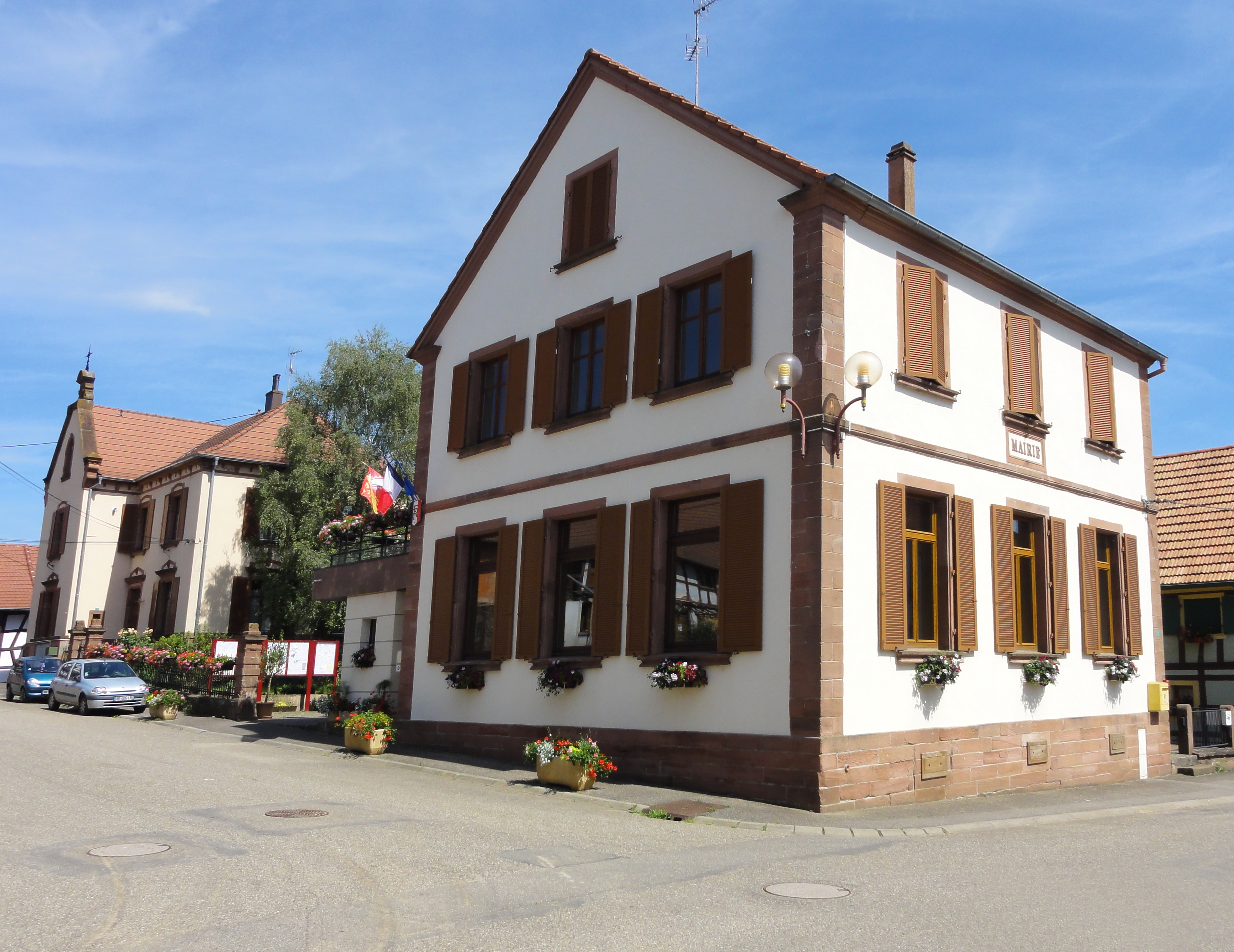 Alsace, Bas-Rhin, Wahlenheim, Mairie-école (XIXe).